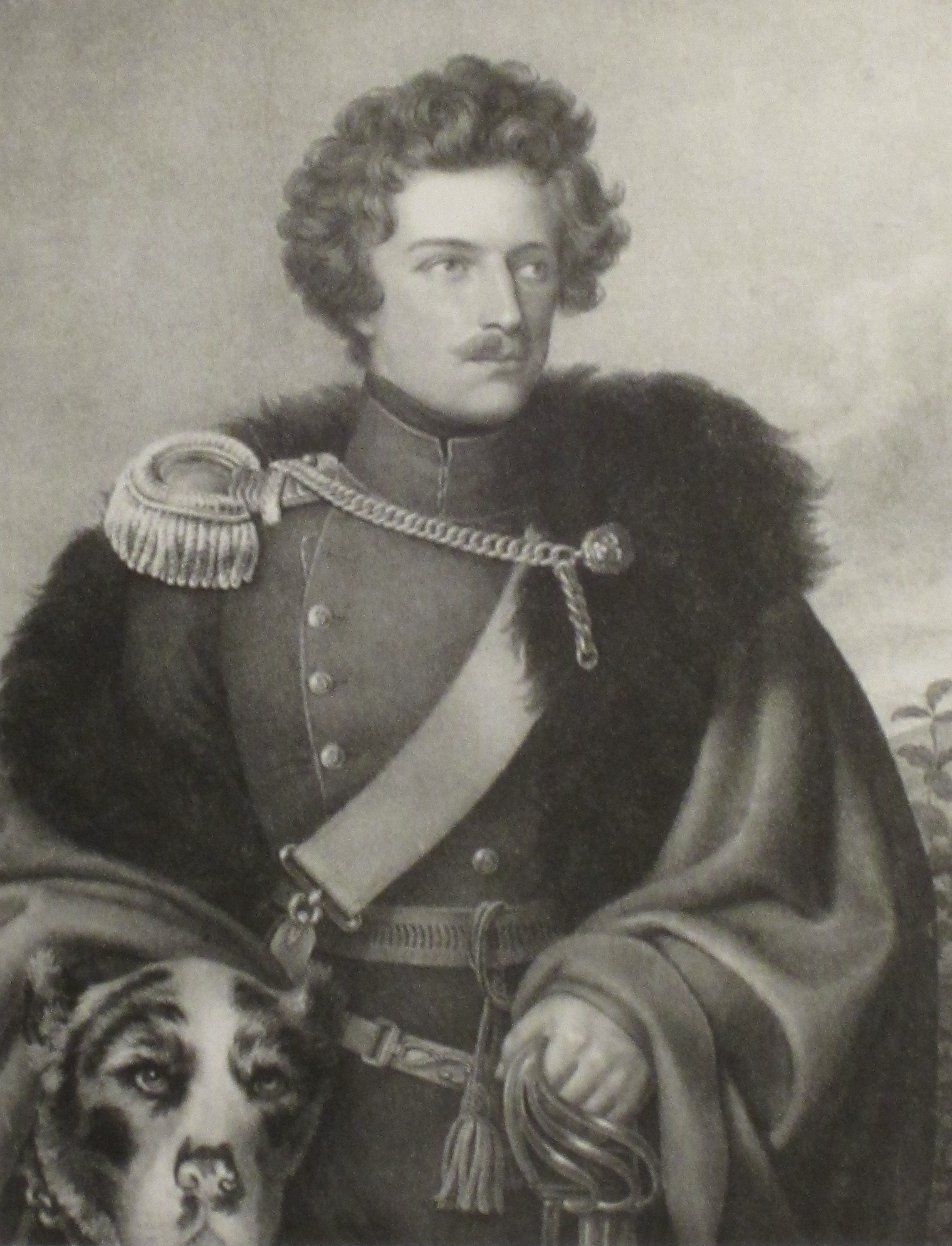 Portrait of Alexander von Württemberg